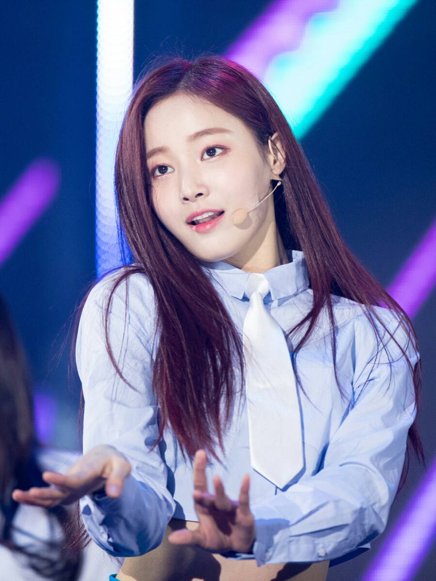 Yeonwoo no Simply K-Pop 'A-Pop Concert' em Jeongseon em 4 de fevereiro de 2018